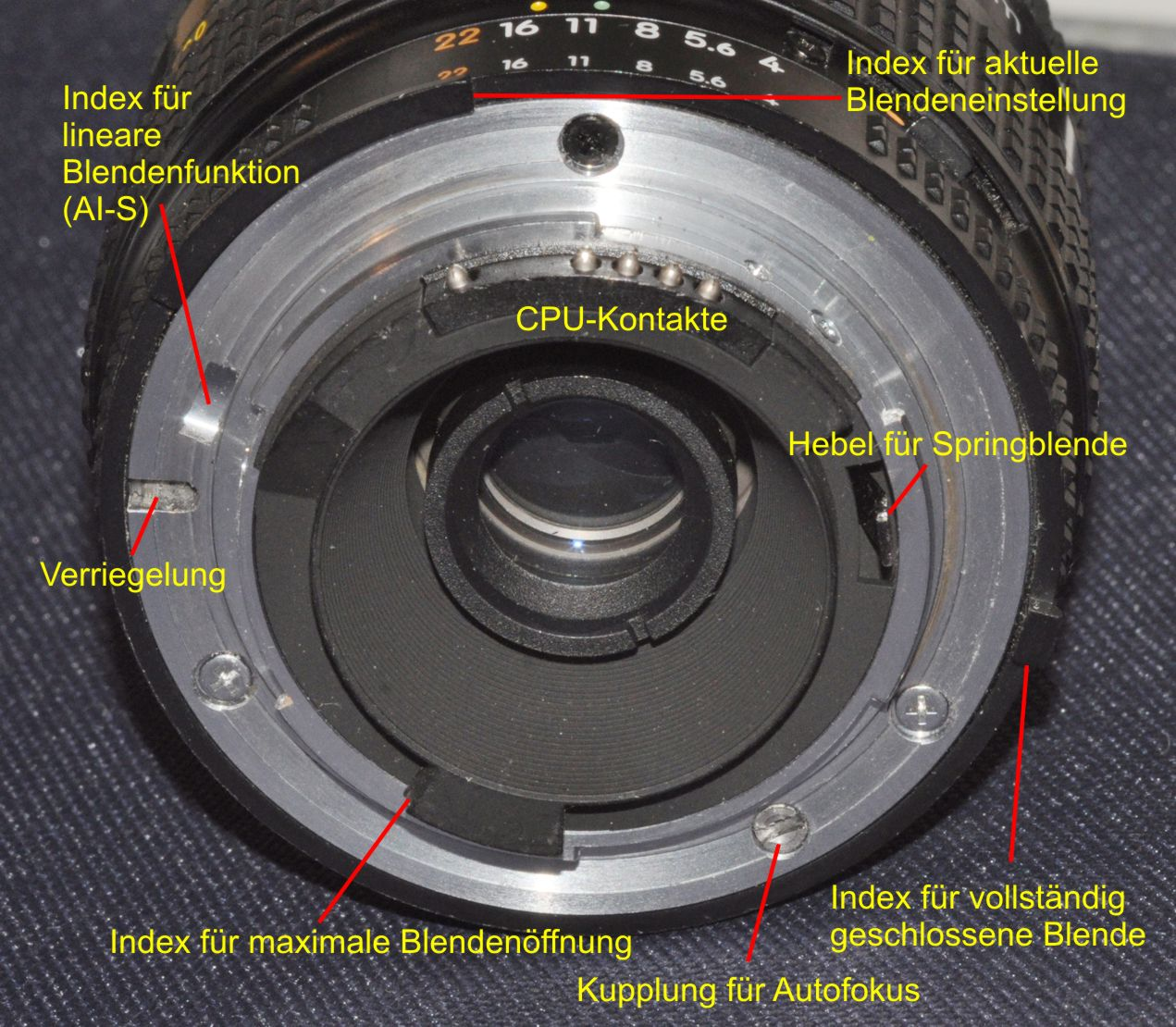 Nikon F-Bajonett eines AF-D 35-80mm